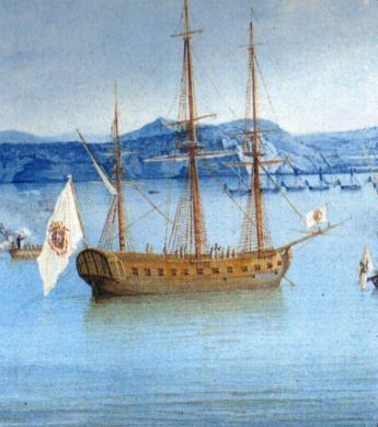 La fregata Minerva in un quadro di Saverio della Gatta